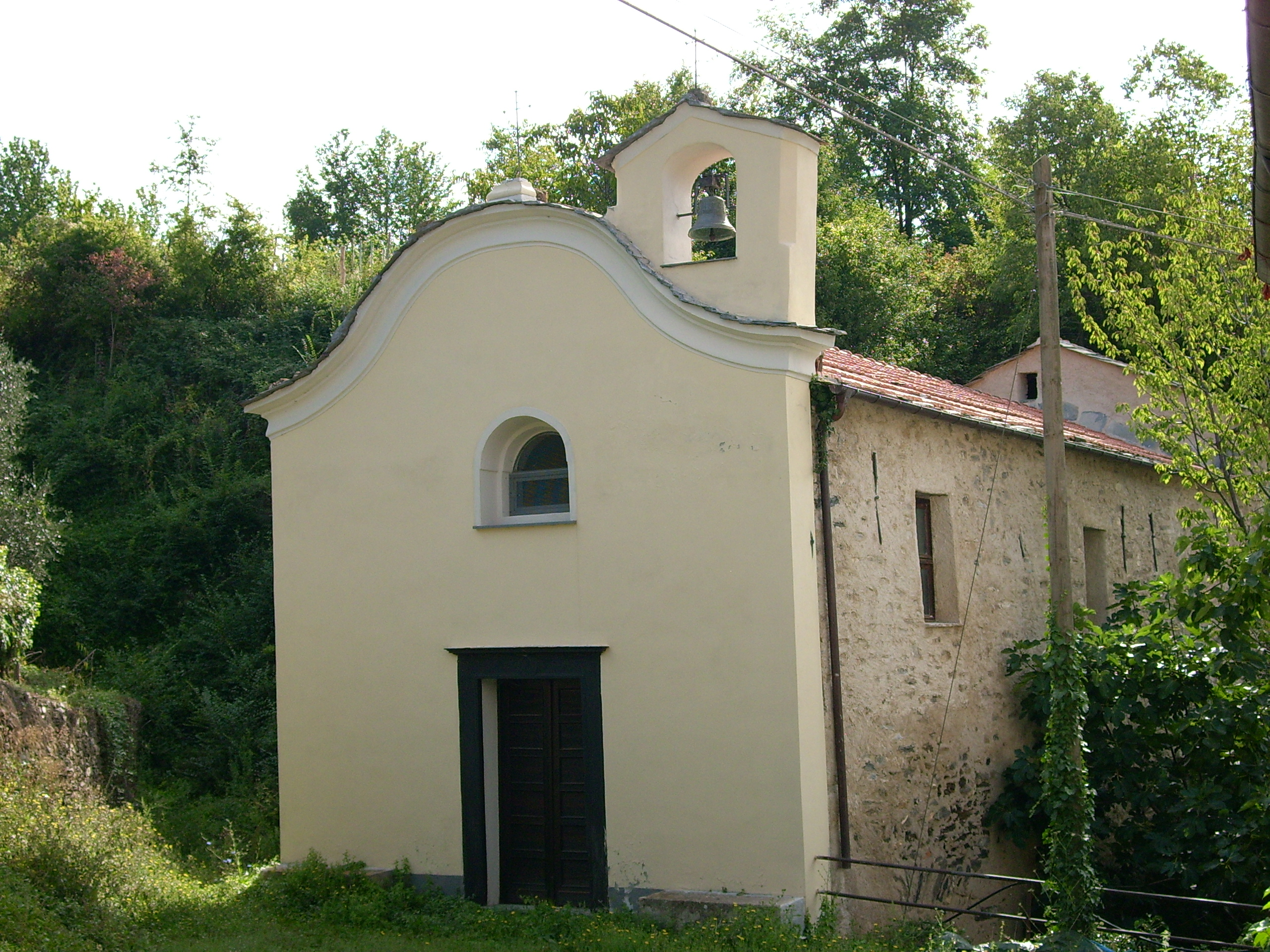 Oratorio presso la chiesa di san Dalmazio di Pornassio, Liguria, Italia